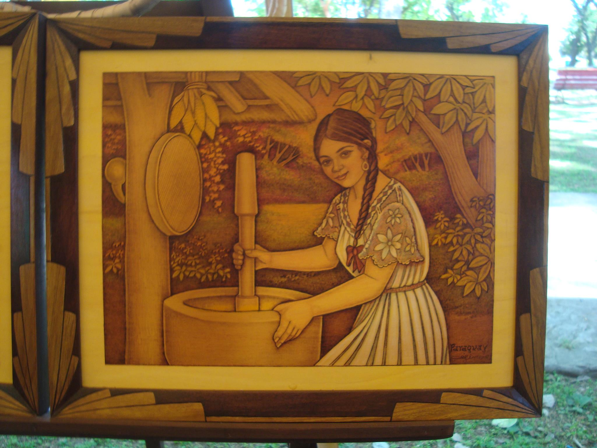 El pirograbado en madera se realiza tradicionalmente con varas de hierro calentadas al rojo vivo en brasas, aunque actualmente suele ser reemplazado por pirograbadores eléctricos. Este trabajo, que incluye una coloración con lápiz acuarelado, es obra de Críspulo Giménez de Caacupé (Paraguay).